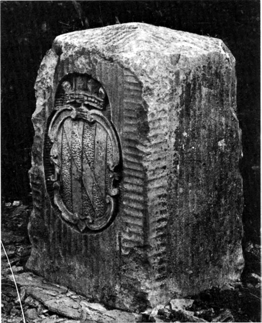 Mason-Dixon Line marker